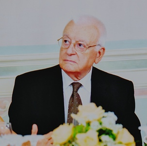 Giorgio Olcese